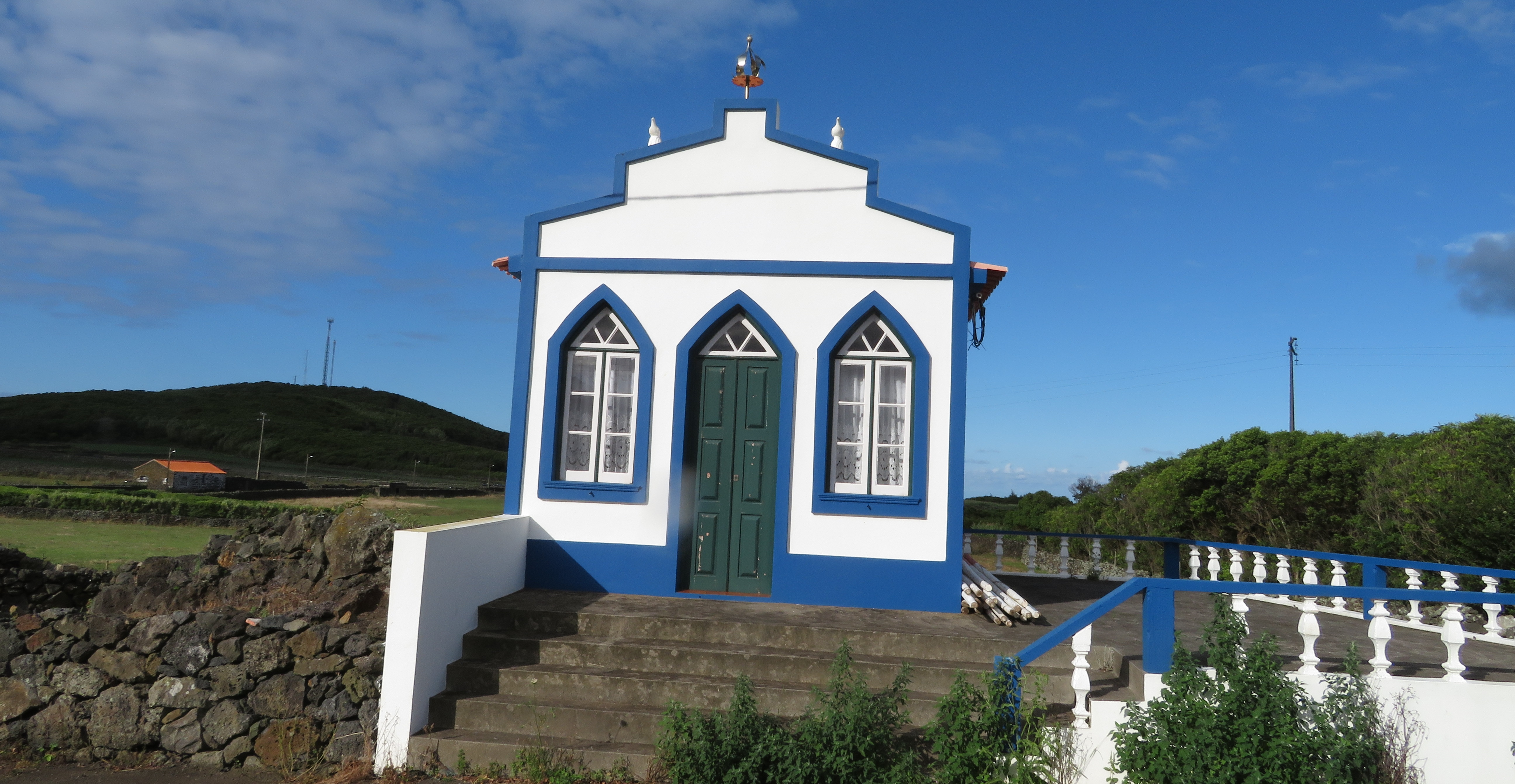 Heilig-Geist-Kapelle. Funchais, Insel Graciosa, Azoren, Portugal.